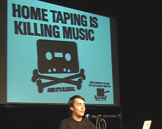 Infoveranstaltung "The Grey Commons" über Piratebay im Clubraum der Roten Fabrik